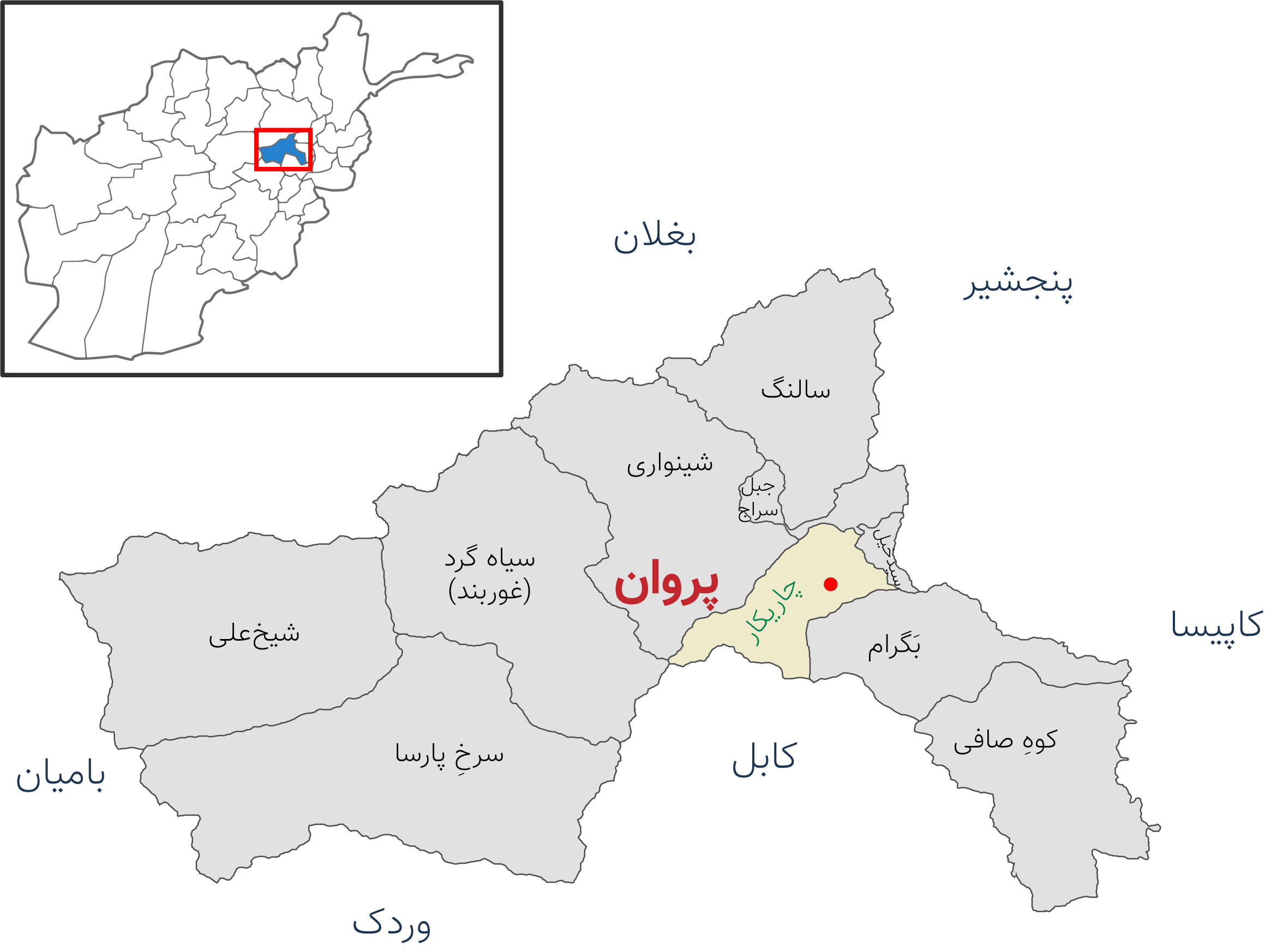 نقشه ولایت پروان